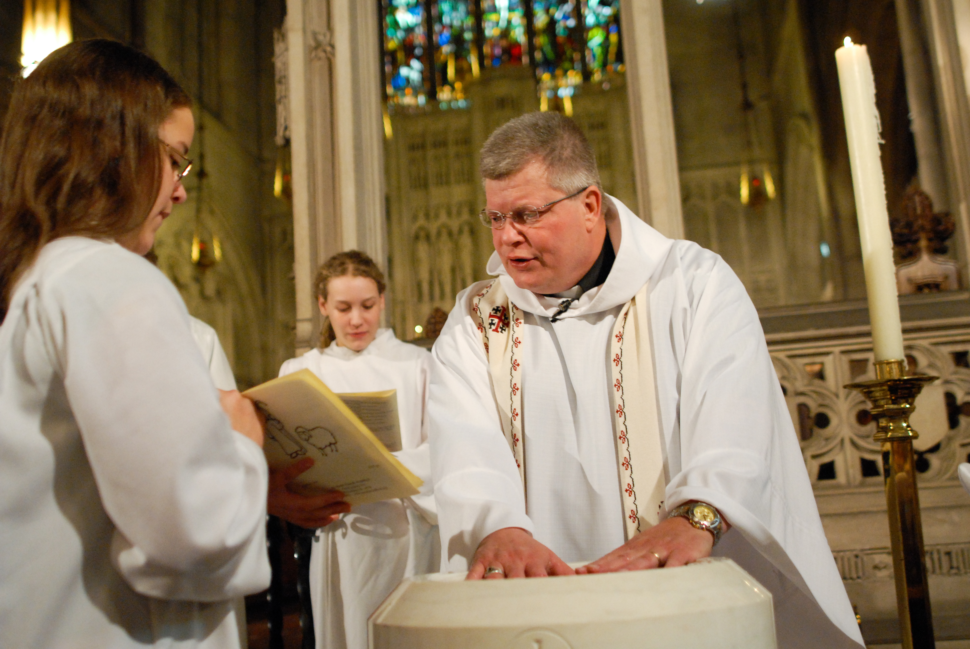 Baptistų dvasininkas.